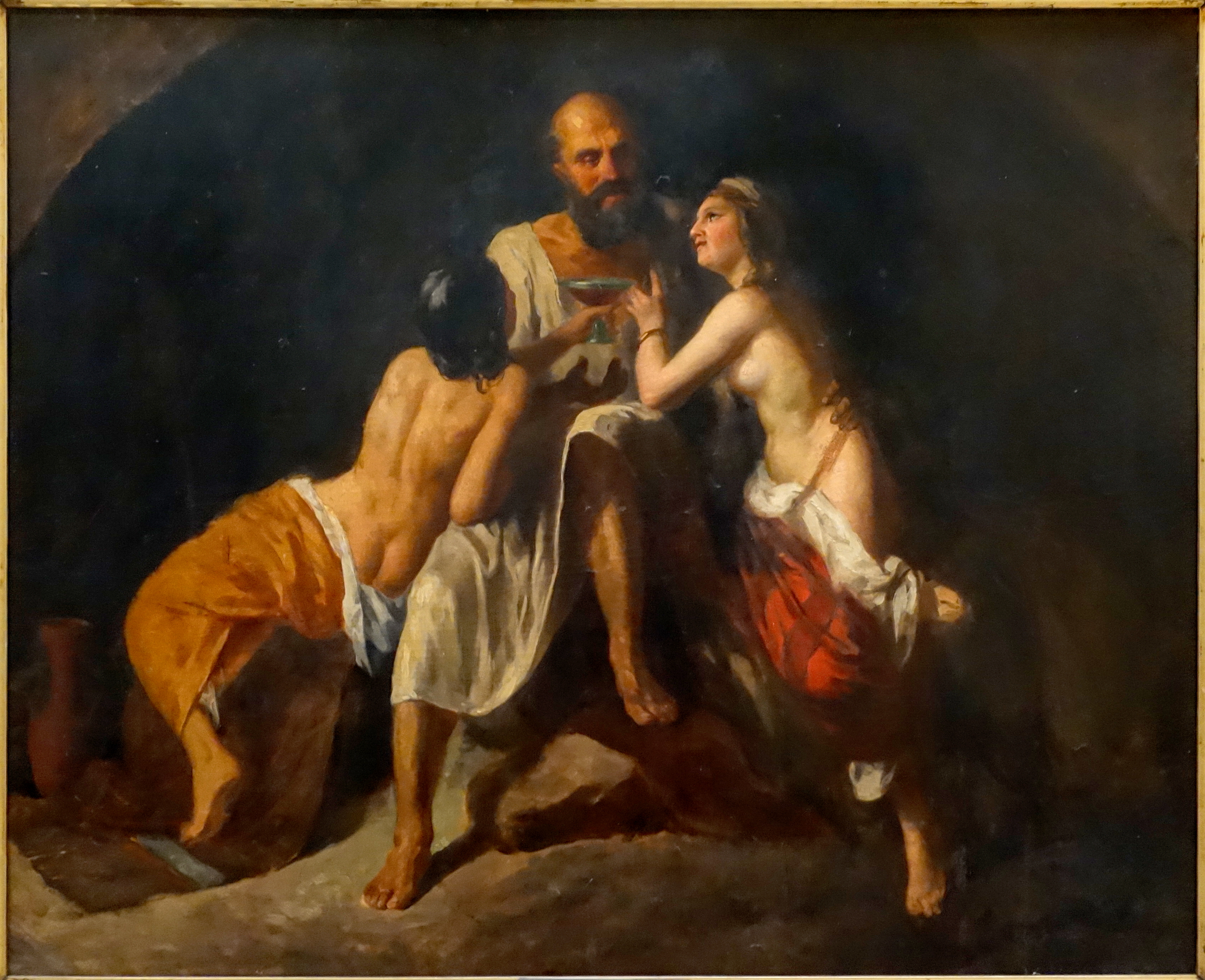 Lot et ses filles au Musée des beaux-arts (art cubain) de La Havane.